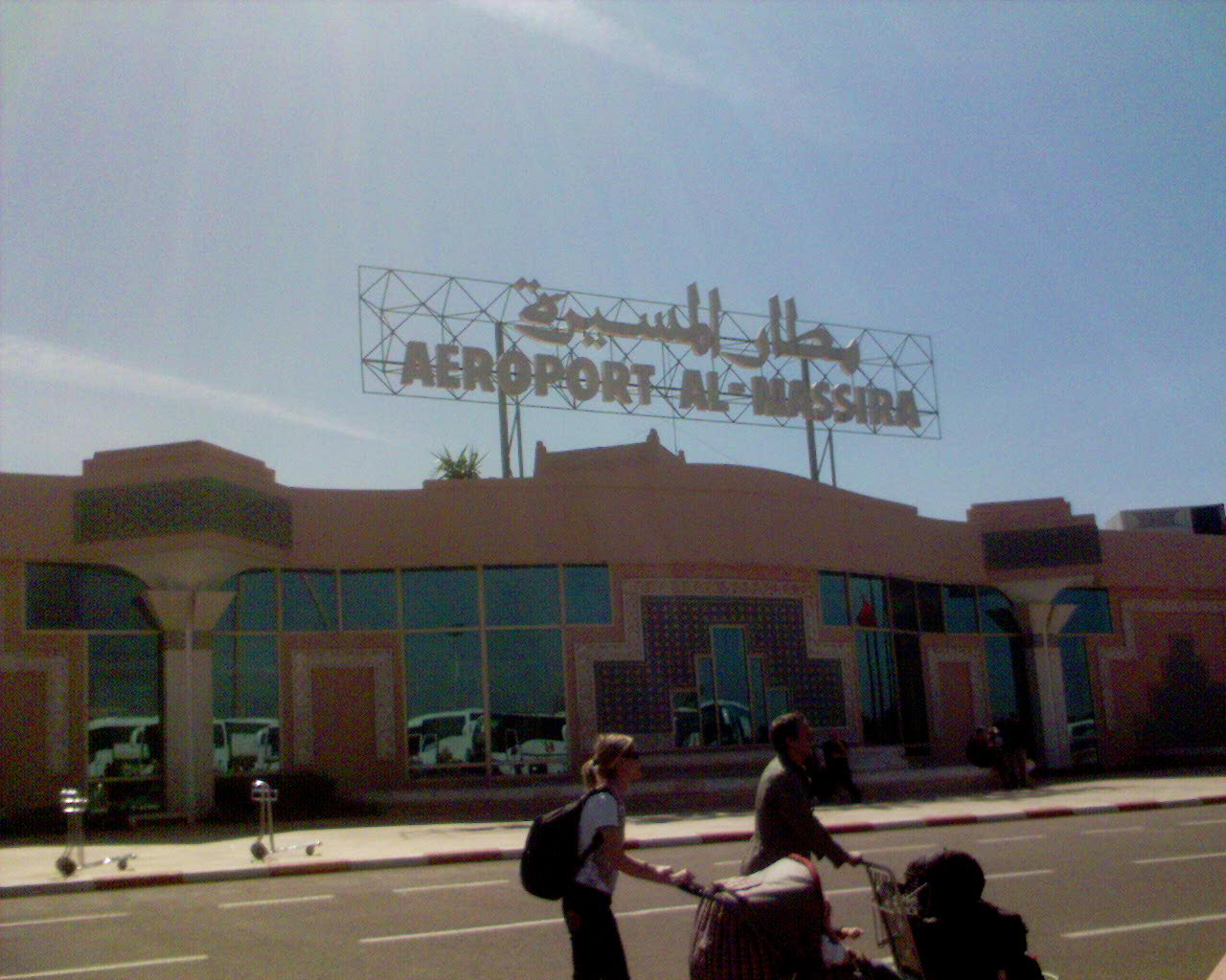 Agadir Airport, Aeroport Al-Massira